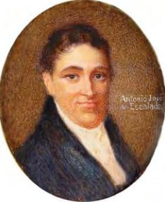 “ANTONIO JOSE DE ESCALADA” Retrato de hombre de tres cuarto perfil con mirada al frente. Al costado se lee Antonio José de Escalada, con la misma letra de la firma de Fernando GARCIA del MOLINO. Marco de bronce con aro superior. Buenos Aires Mediados del Siglo XIX Medida: 6,6 x 5,2 cm. Ex Colección Luis GARCIA LAWSON. Colección Fernando GARCIA BALCARCE.